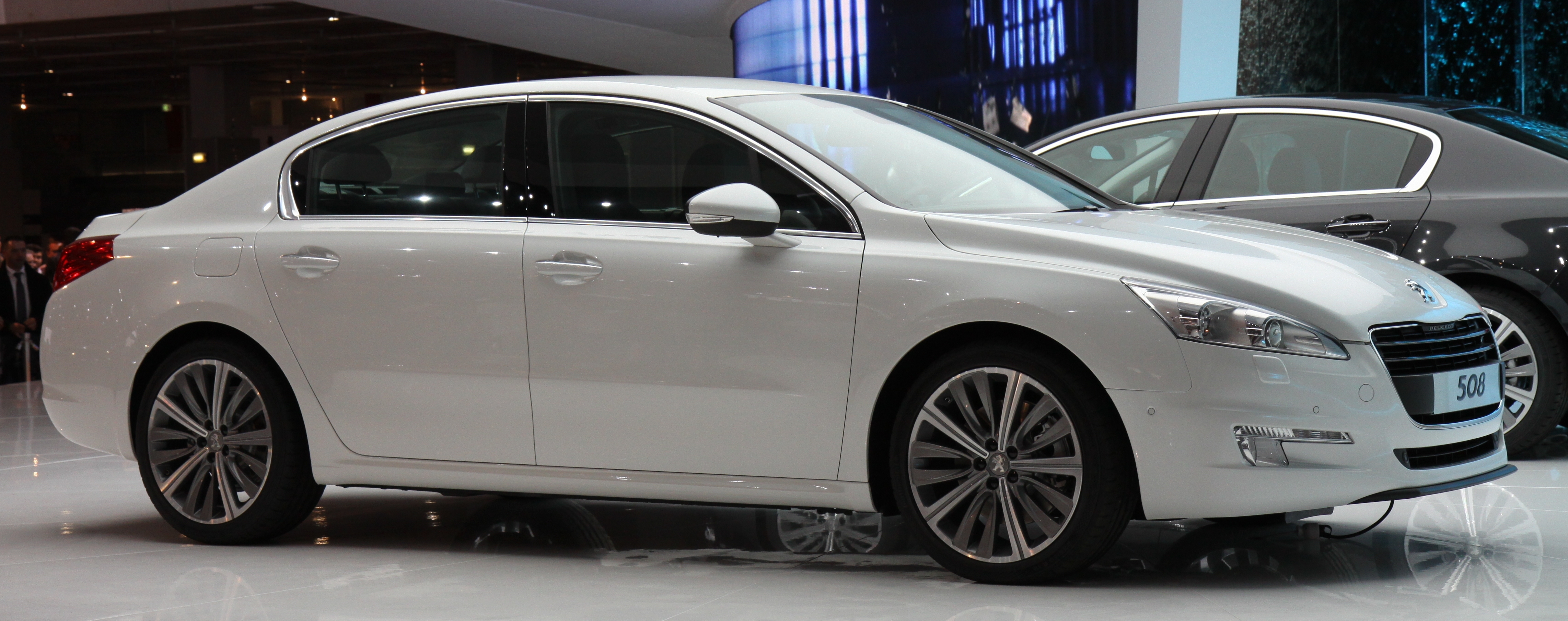 Paris - Mondial de l'automobile 2010